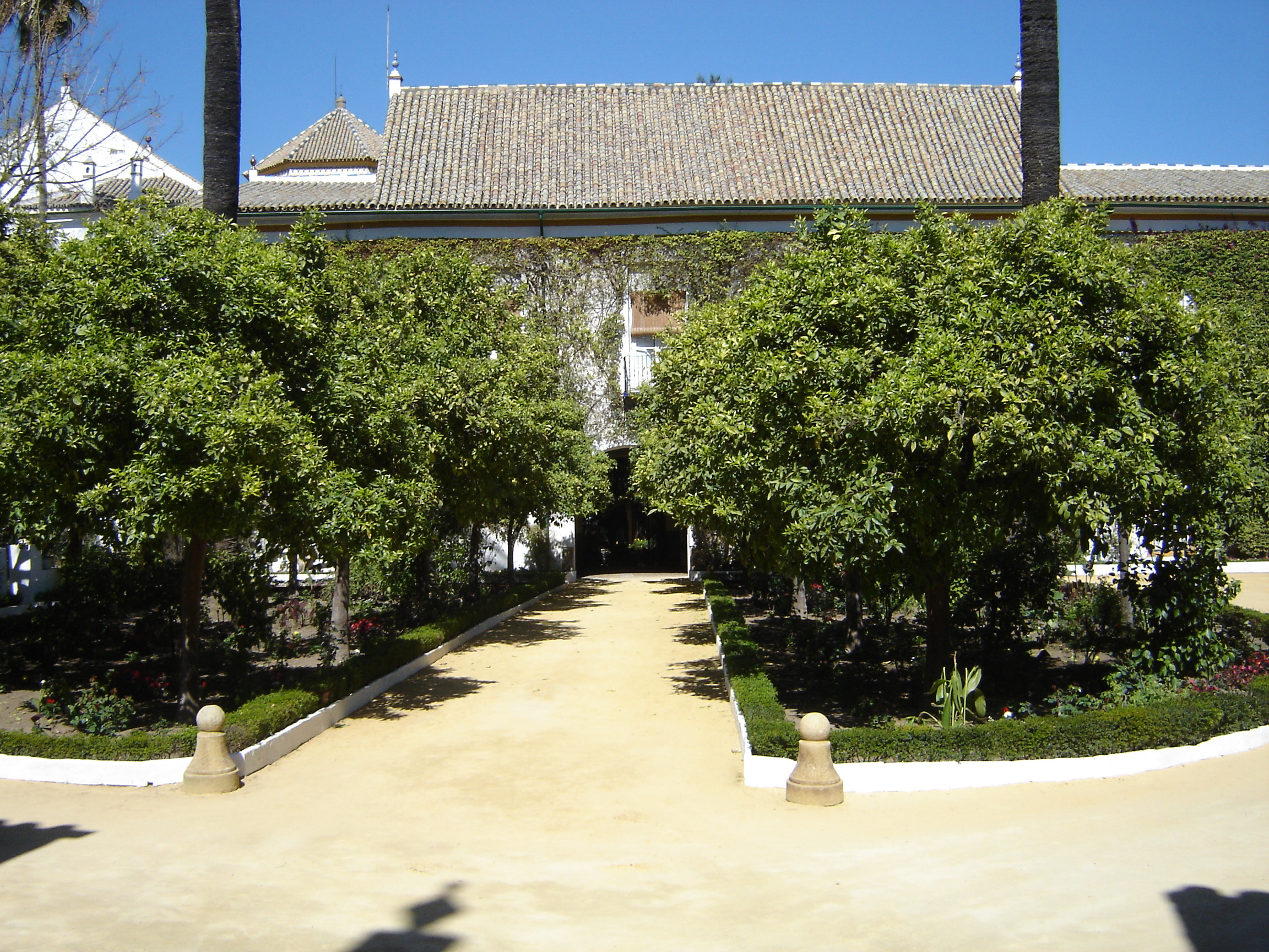 Palacio de las Dueñas (Sevilla). Patio principal. Jardines. Realización propia.